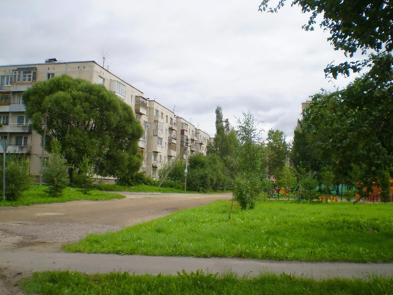 Посёлок Романовка.